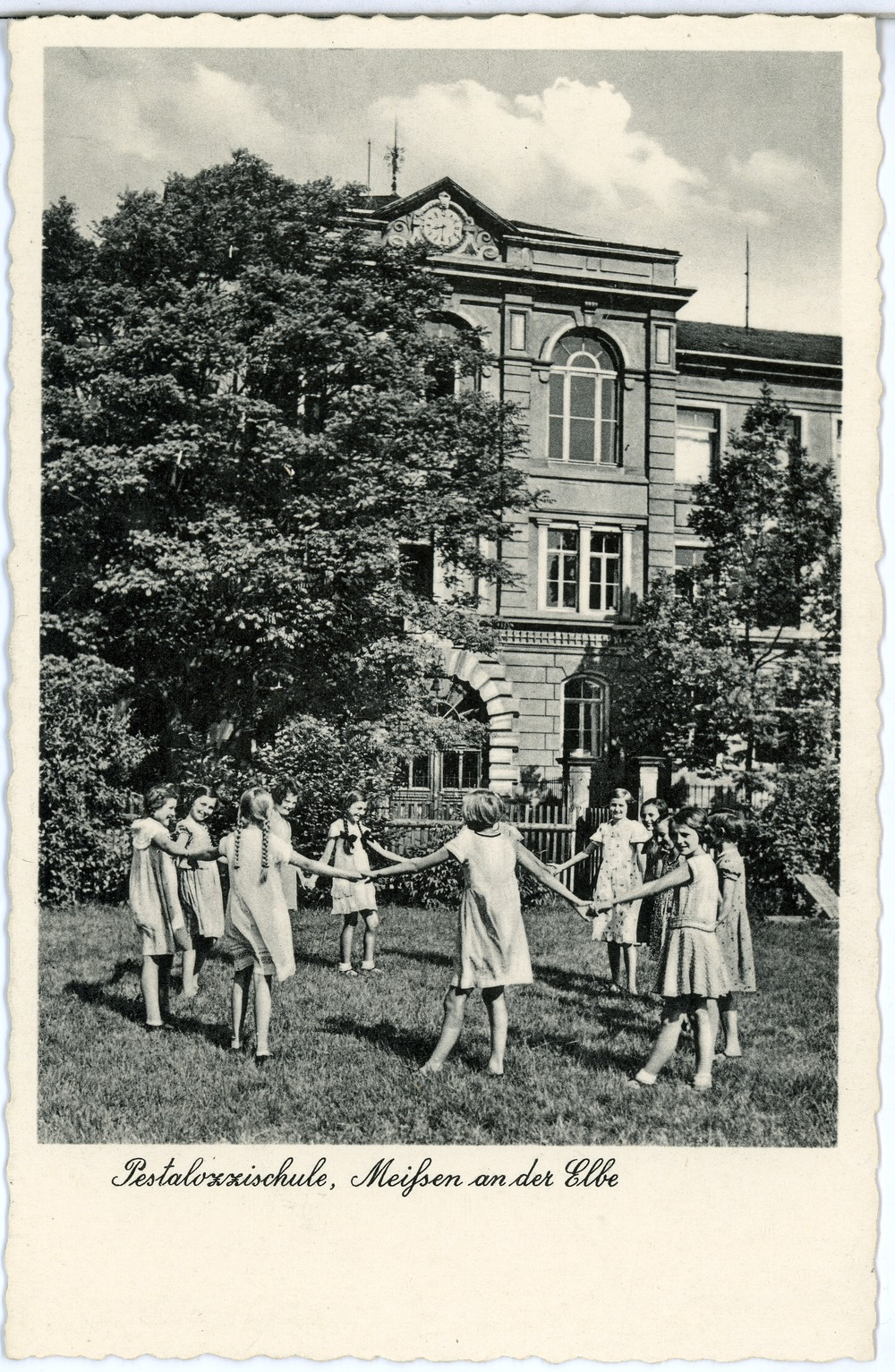 Meißen; Pestalozzischule This postcard is from publisher Brück & Sohn in Meißen ( postcard has a unique number 27104 and is available in a higher resolution at the publisher. This images was uploaded in a cooperation project between Wikipedians and the publisher.